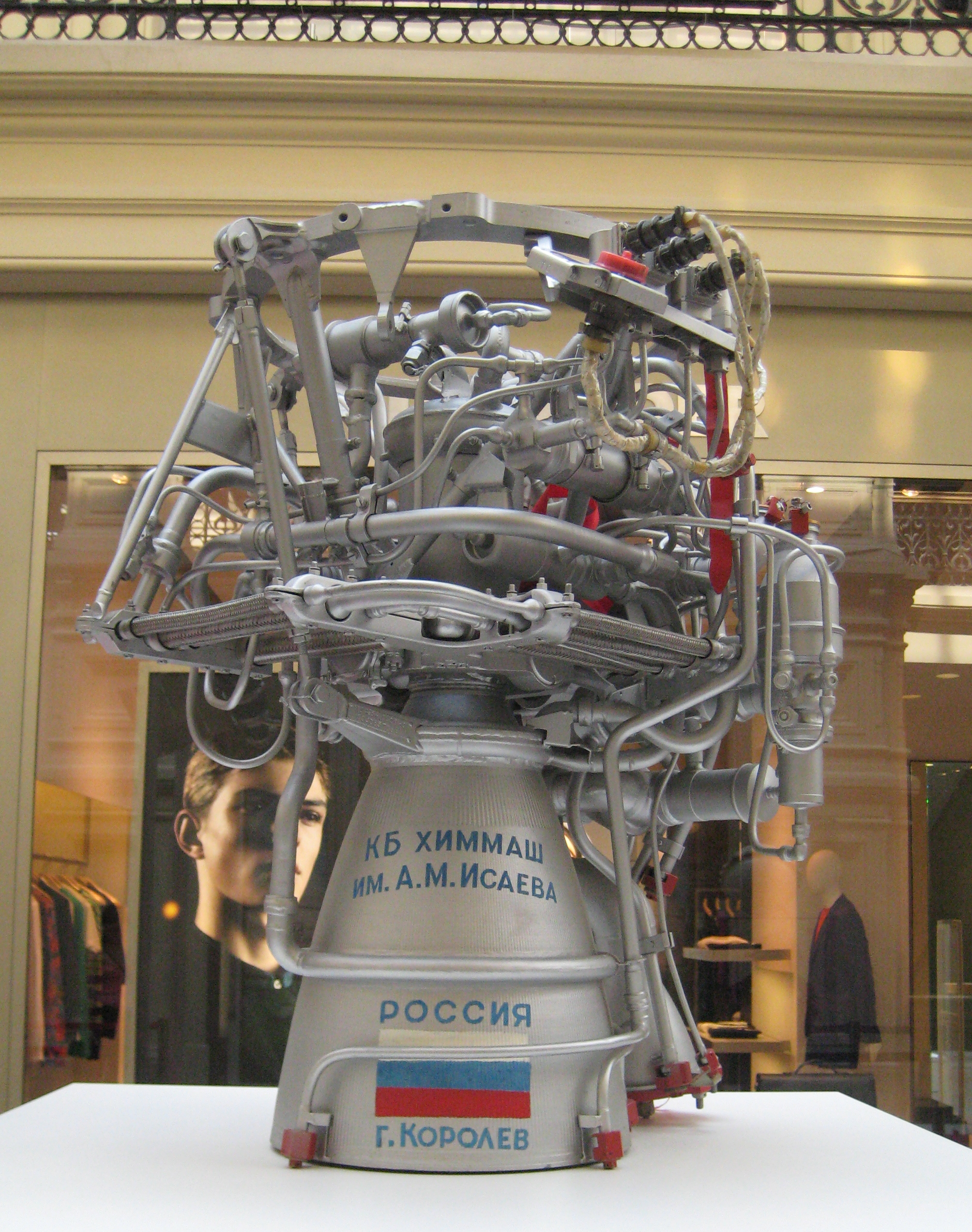 Жидкостный ракетный двигатель автоматической межпланетной станции "Марс-Венера". 2004. Производство КБ химического машиностроения им. А.М. Исаева - филиала Научно-производственного центра им. М.В. Хруничева. КОролевский исторический музей.